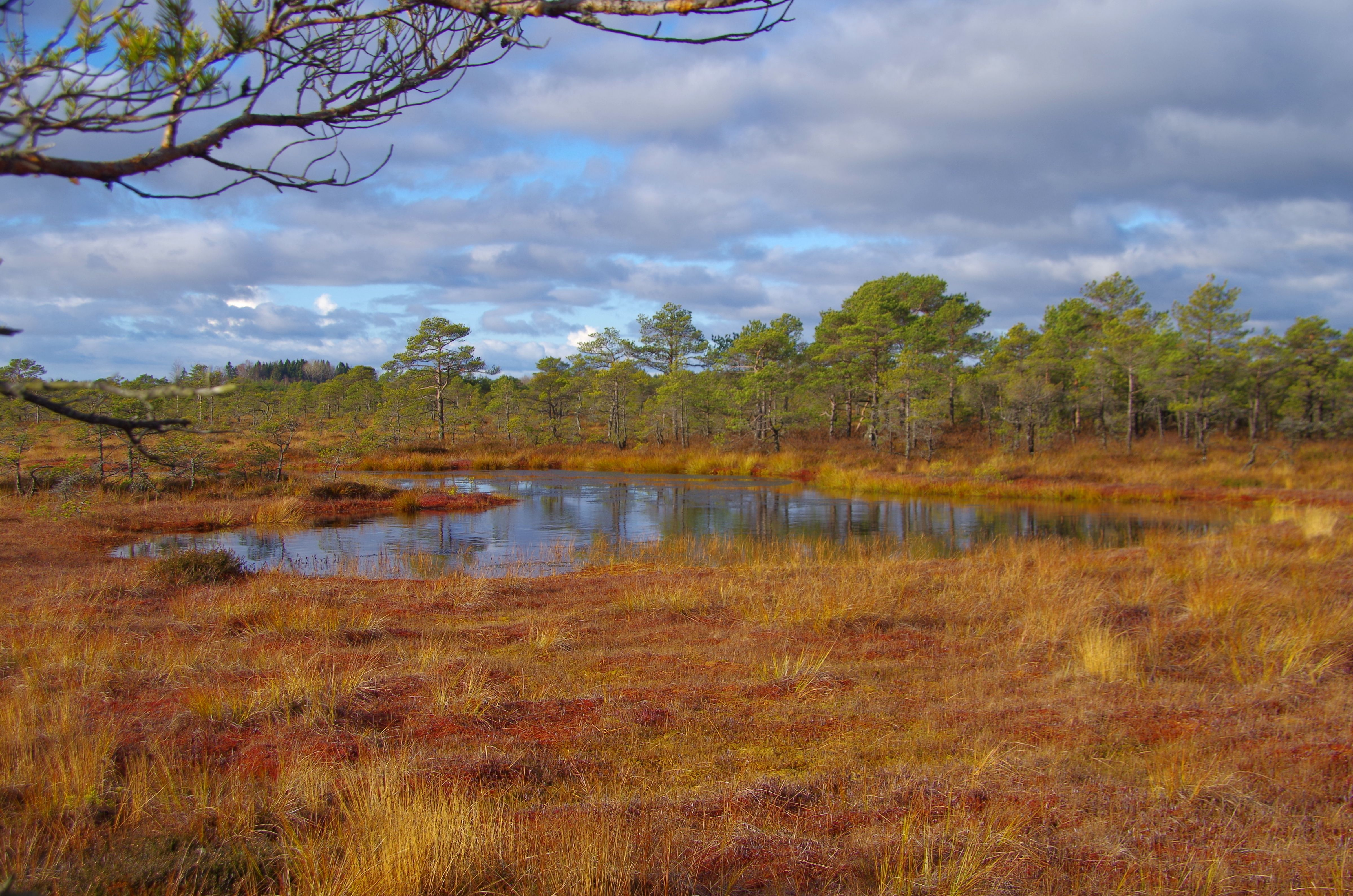 Palasi raba asub Kõnnumaa maastikukaitsealal, Rapla maakonnas, Kehtna vallas.